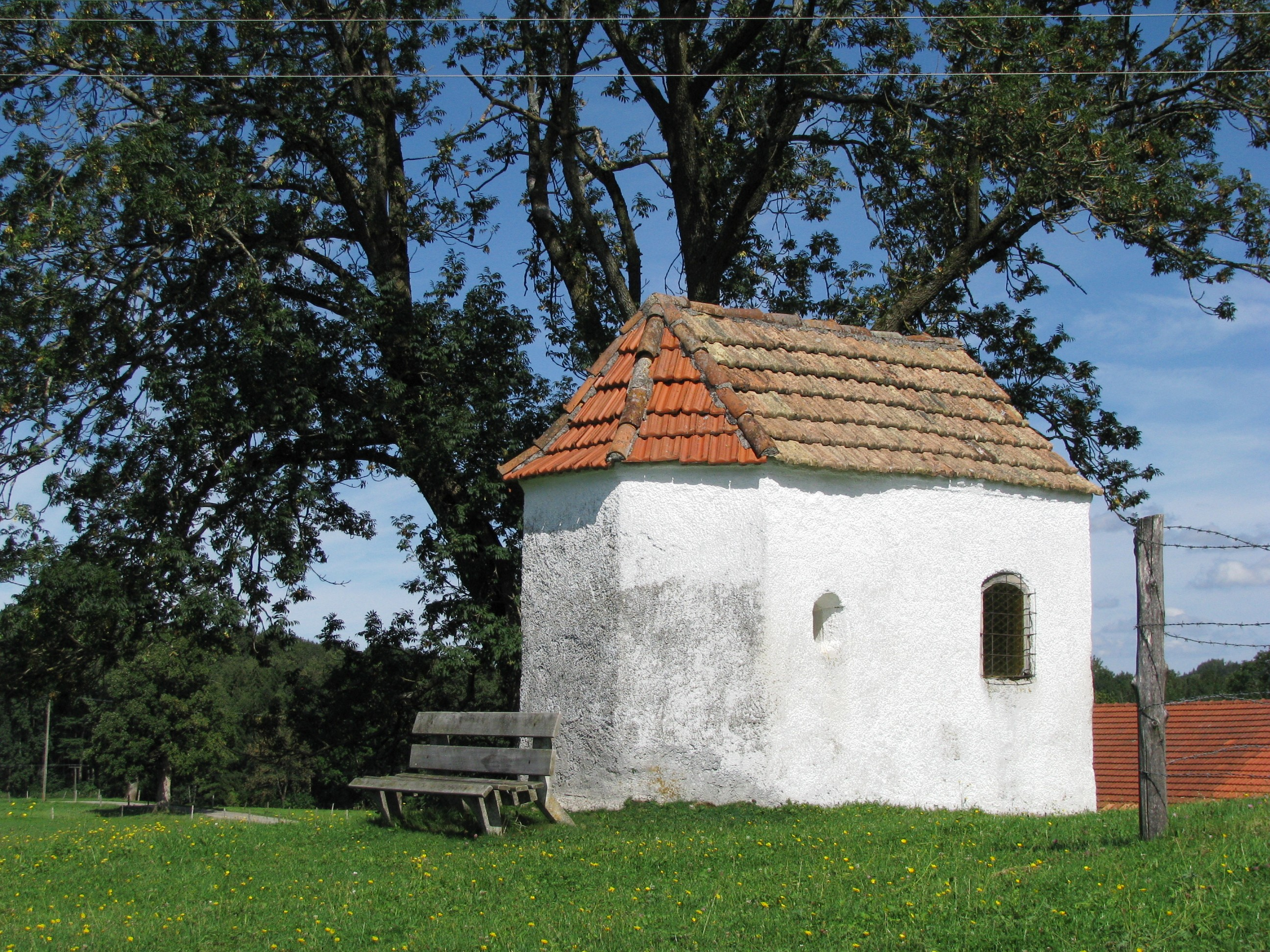 Feldkapelle bei Oed, Gemarkung Beuerberg, Satteldachbau, 1. Hälfte 19. Jh. This is a photograph of an architectural monument.